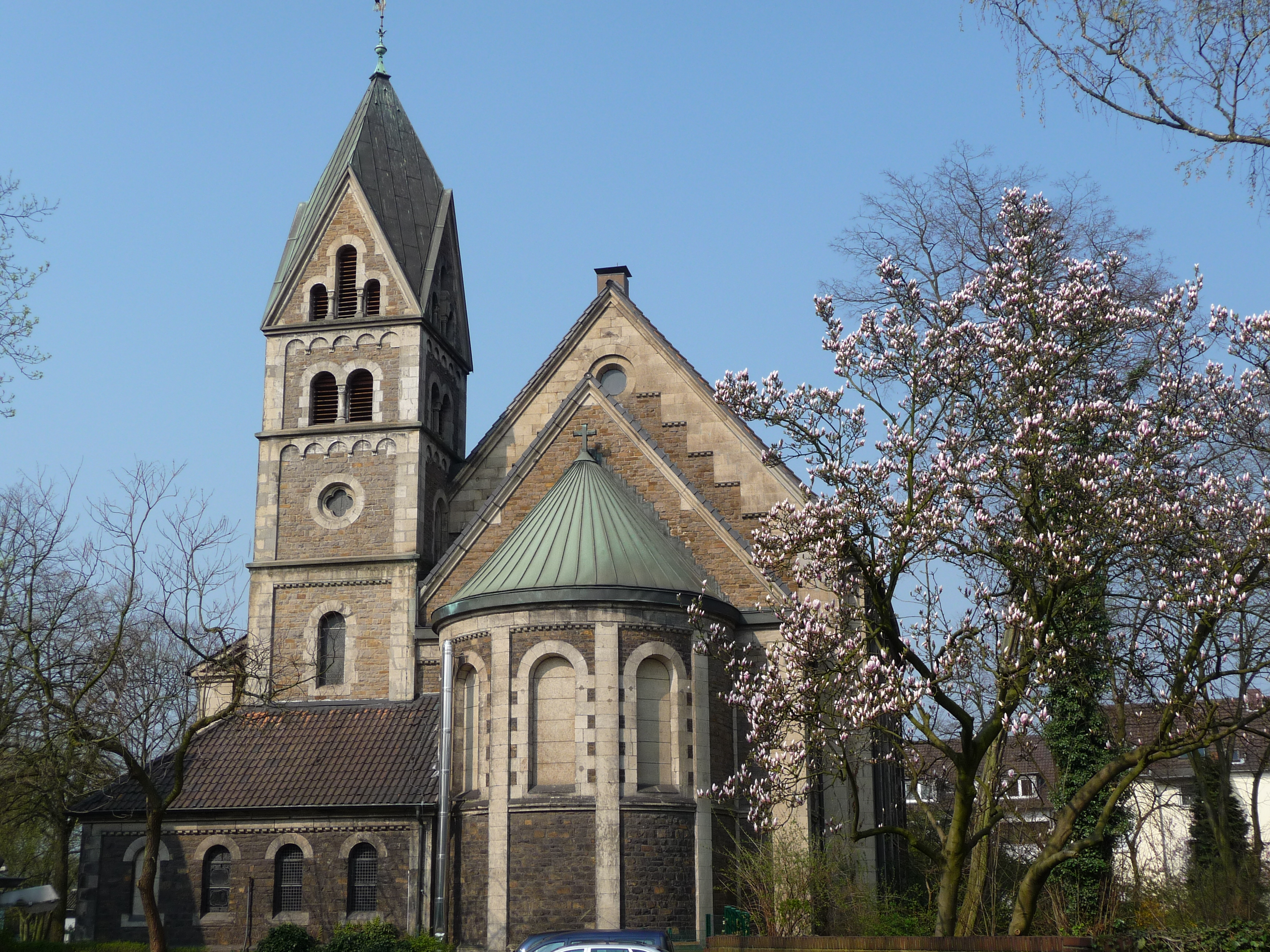 Oberhausen-Alstaden 2010-04-12 – Ev. Kirche der Emmaus-Kirchengemeinde Oberhausen – Ansicht von Osten